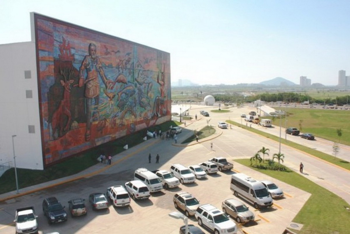 Fotografía aérea del mural ubicado en el exterior del edificio International Center en Mazatlán Sinaloa Mexico.